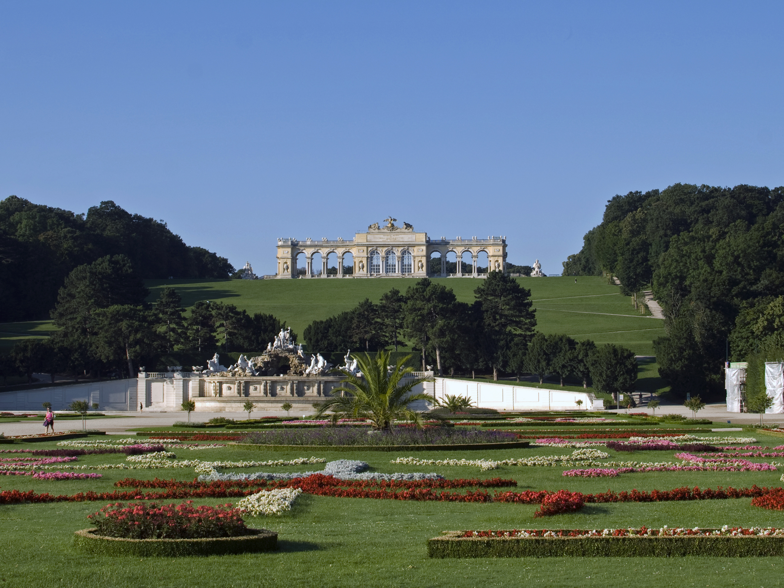 Blick auf die Gloriette